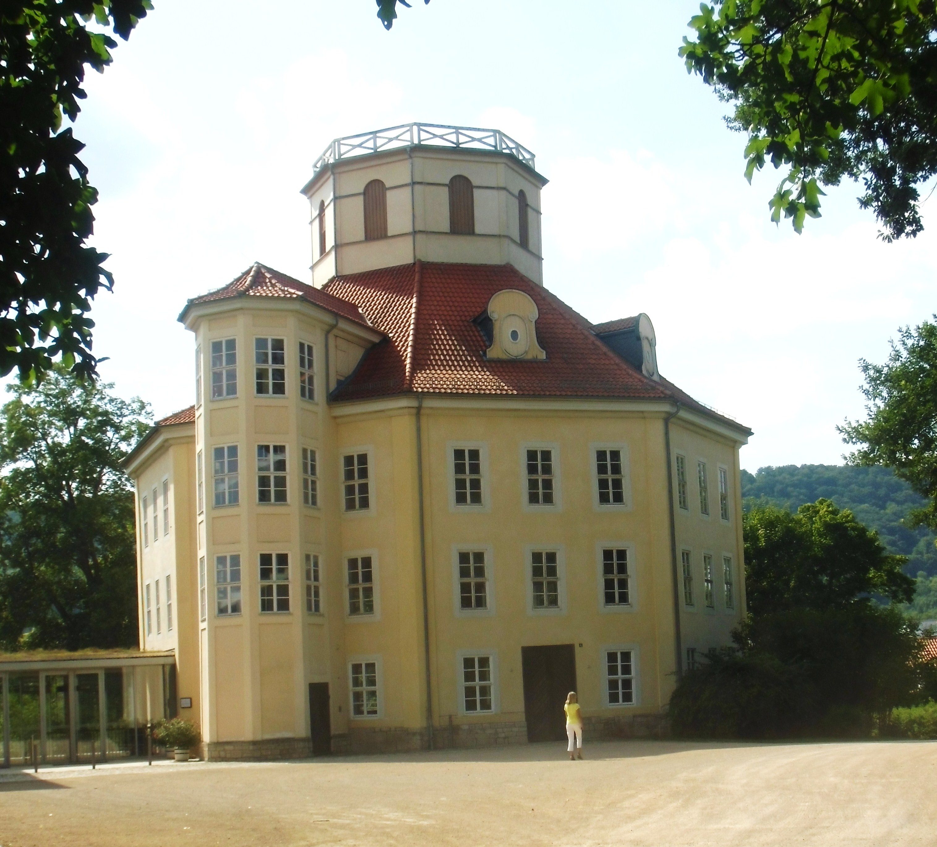 Bau in Gestalt eines regelmäßigen Oktogons von 22 Metern Durchmesser, 1709-1710 auf dem Gelände des Schlosses Sondershausen errichtet